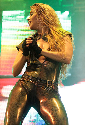 Joelma performando no sambódromo do Anhembi, em São Paulo, em 2010.